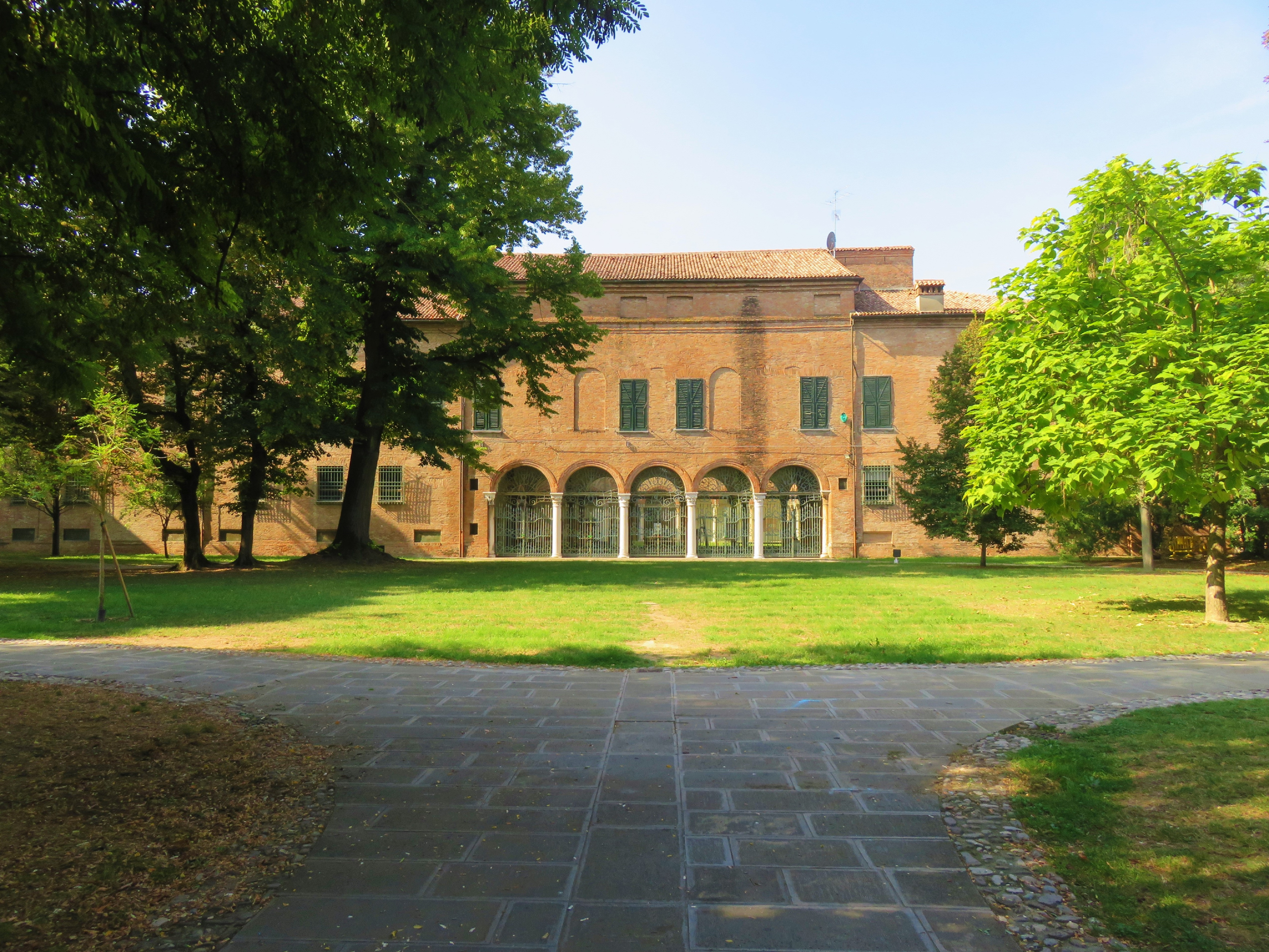 Parco Pareschi è un parco pubblico di Ferrara nato come giardino del palazzo Estense (poi noto come palazzo di Renata di Francia).